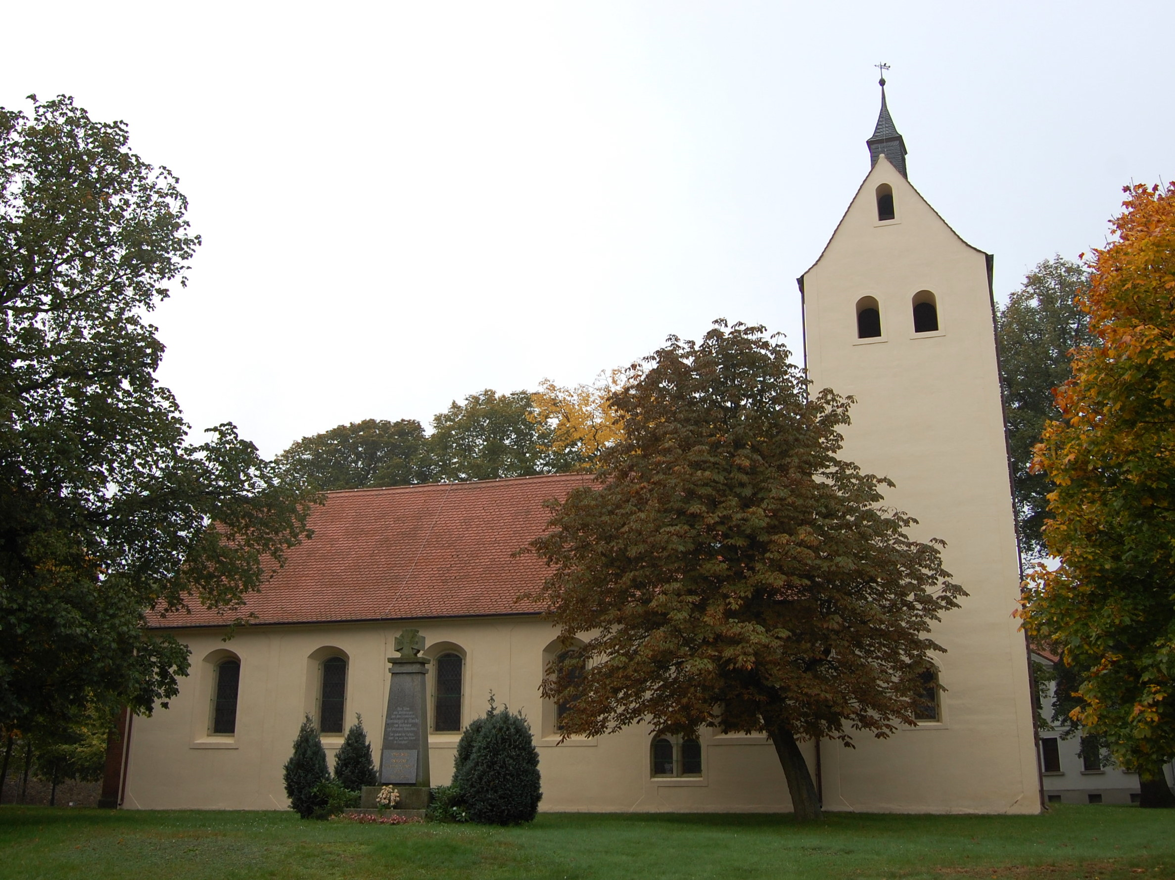 Sankt-Sebastian-Kirche Samswegen